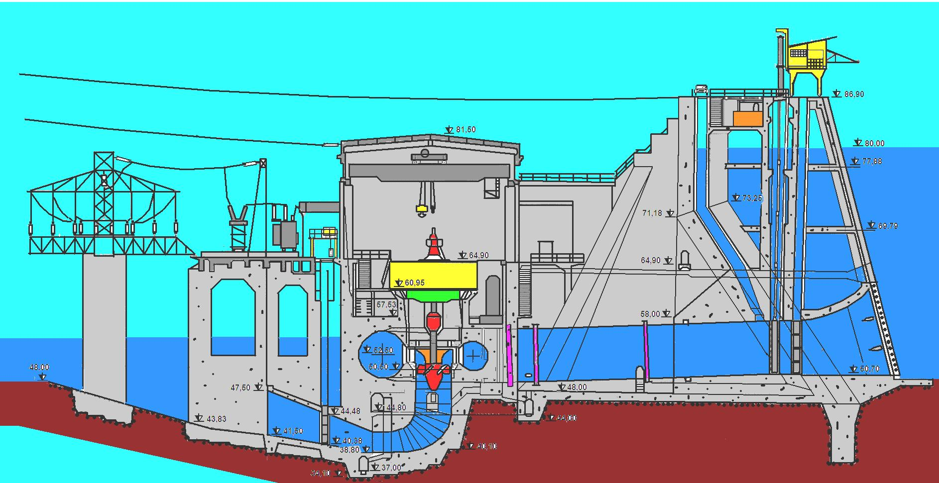 Perfil de la Central Hidroeléctrica Dr. Gabriel Terra o Rincón del Bonete